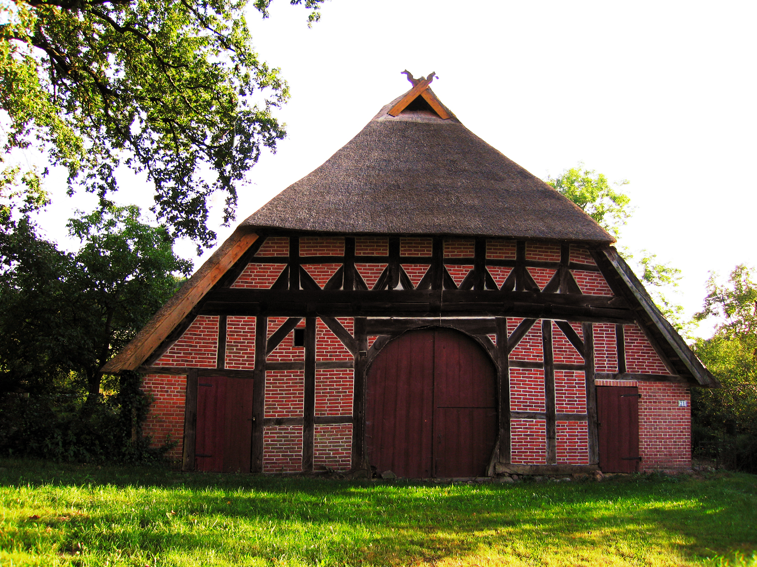 timbered house in Laupin, Mecklenburg-Vorpommern, Germany